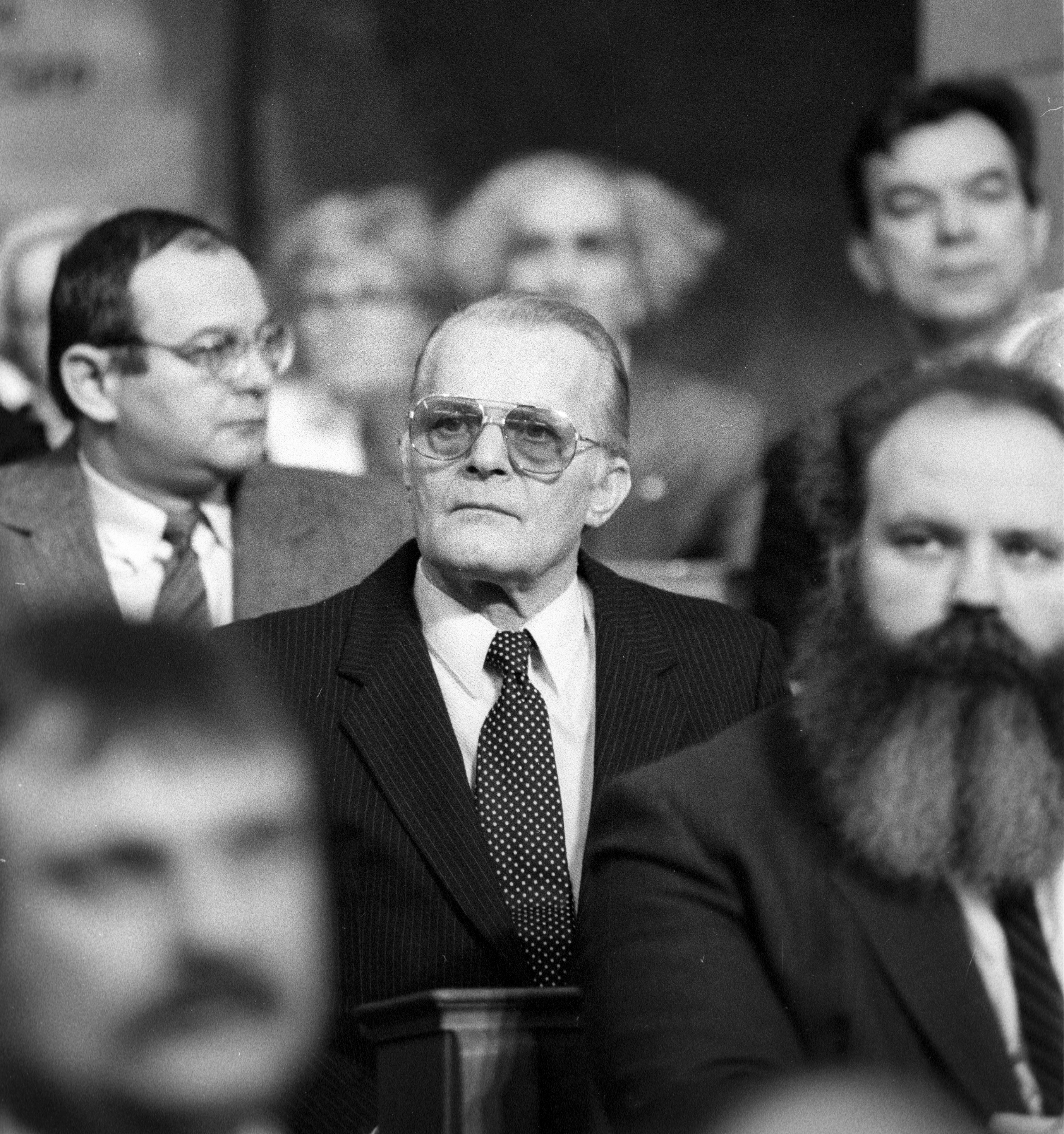 Budapest, Parlament, középen Darvas Iván színművész, mögötte Faludy György és ifj. Rajk László, előtte Iványi Gábor.